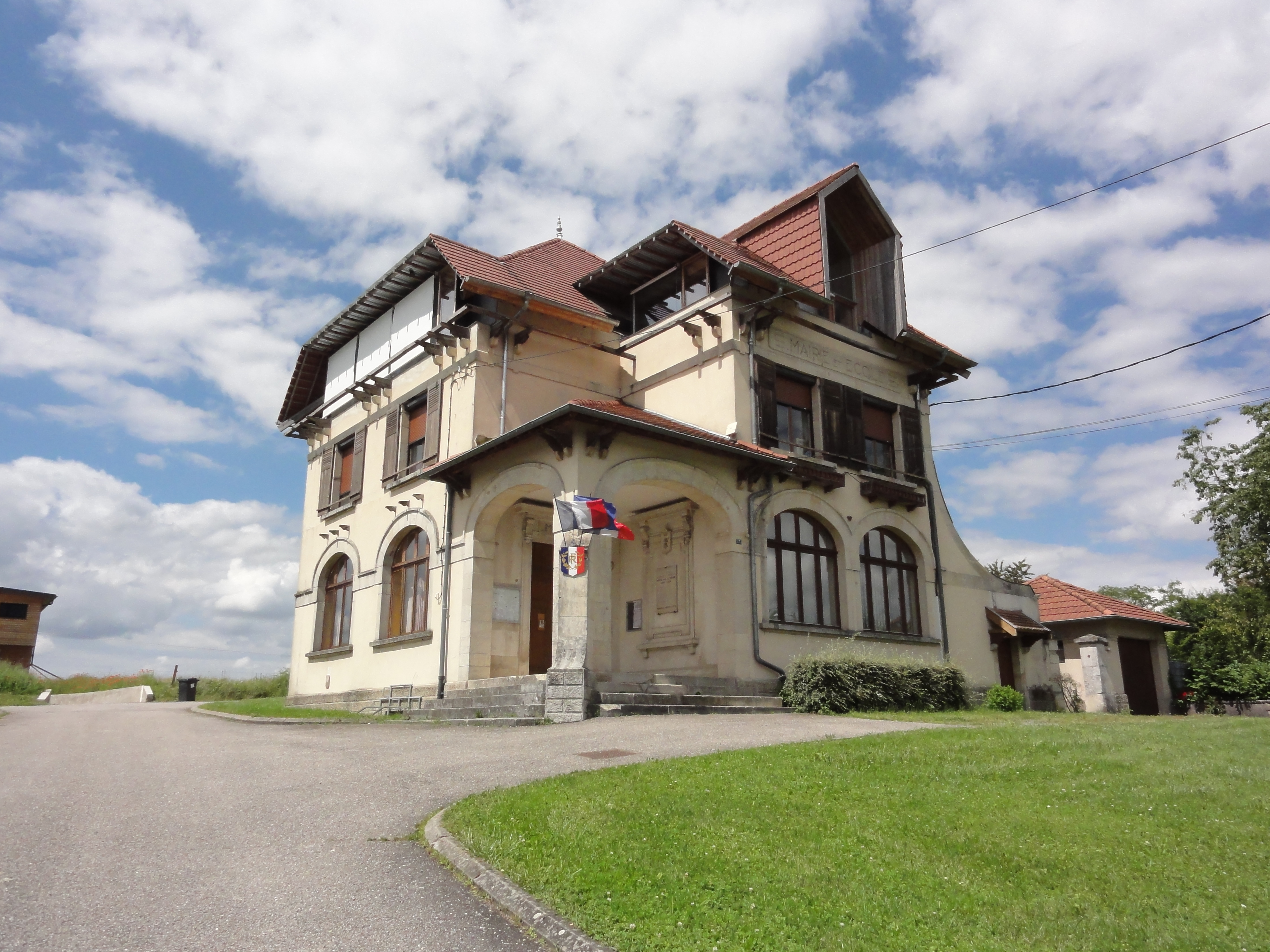 Reillon (M-et-M) mairie - école